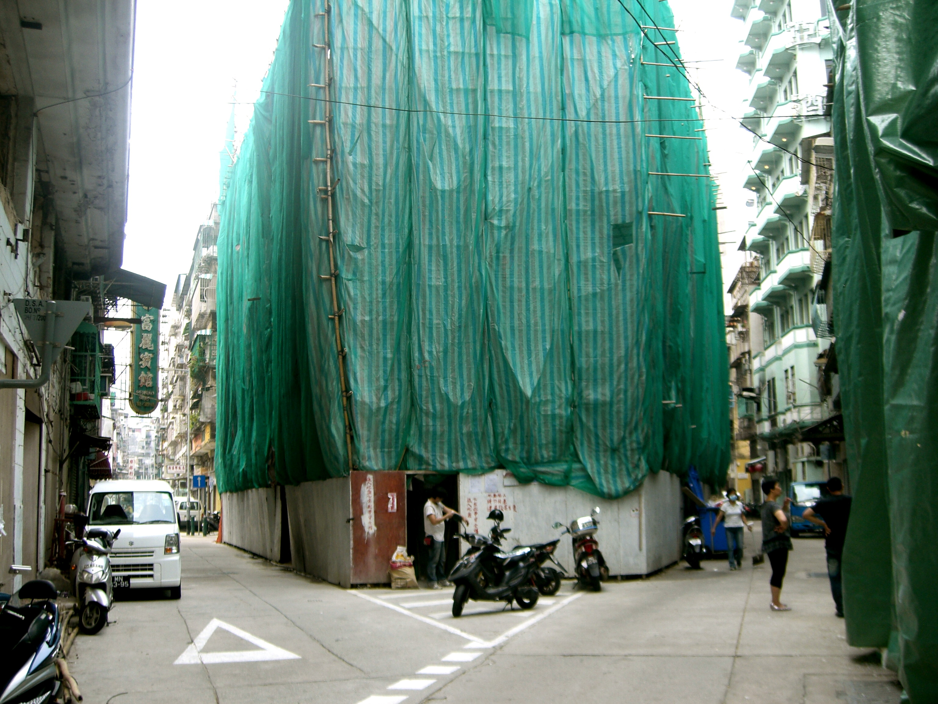 Hotel Cantao